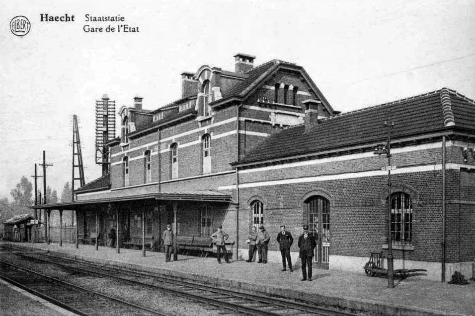 La gare de Haecht et son ancien bâtiment au début des années 1920.